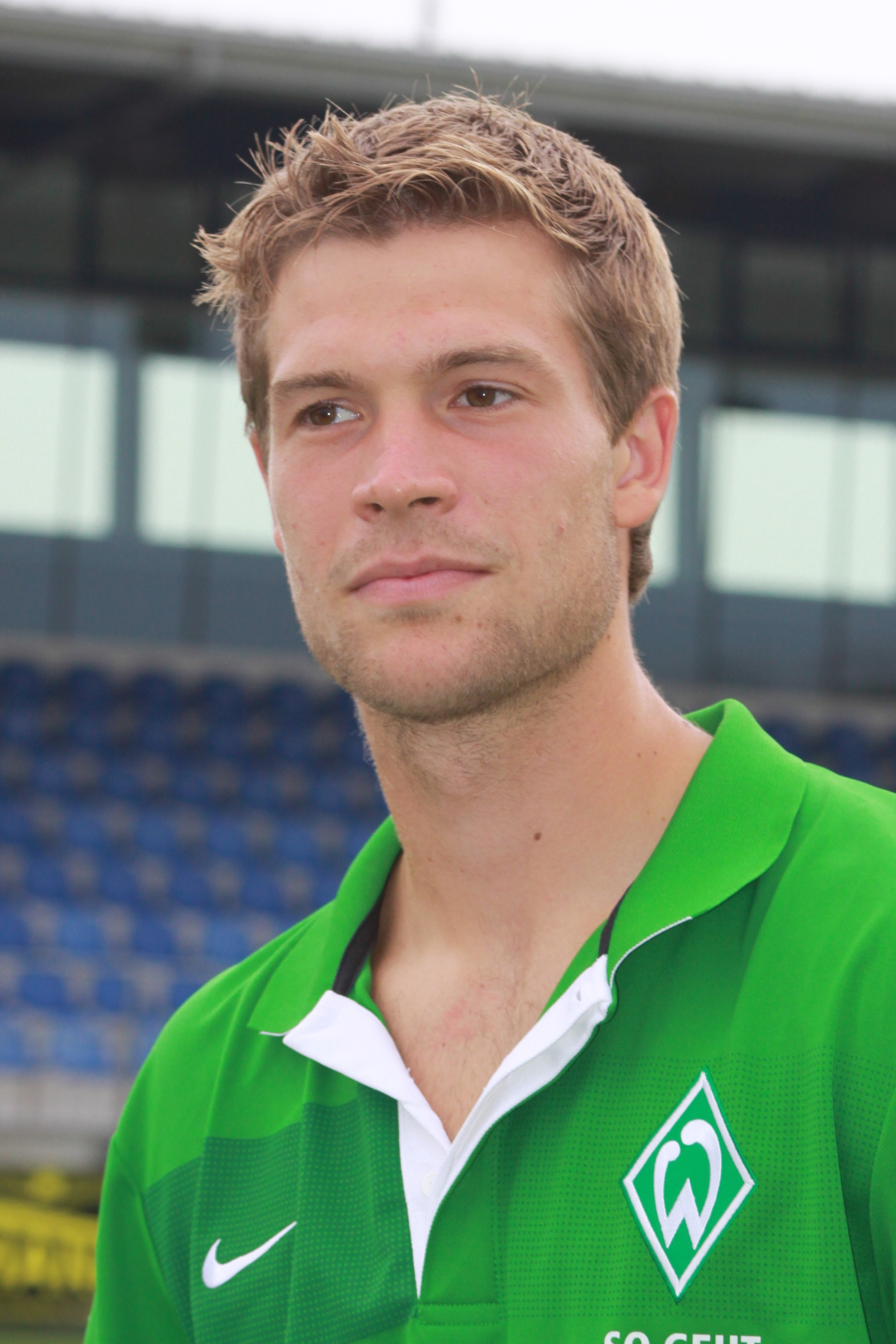 Márkó Futács - SV Werder Bremen (1)